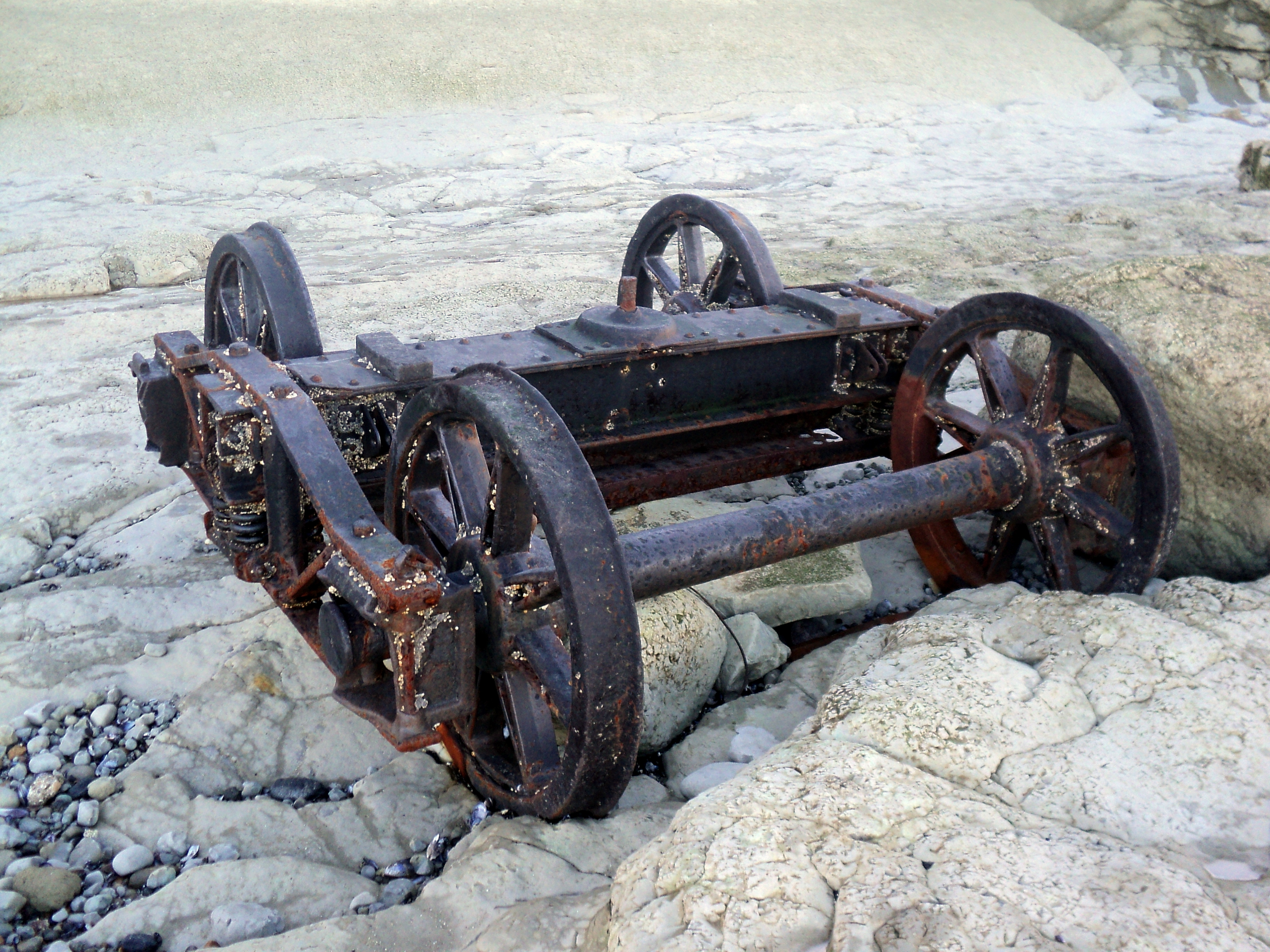 Bugie abandonado en la playa costanera del centro de Comodoro. Victima de algún descarrilamiento